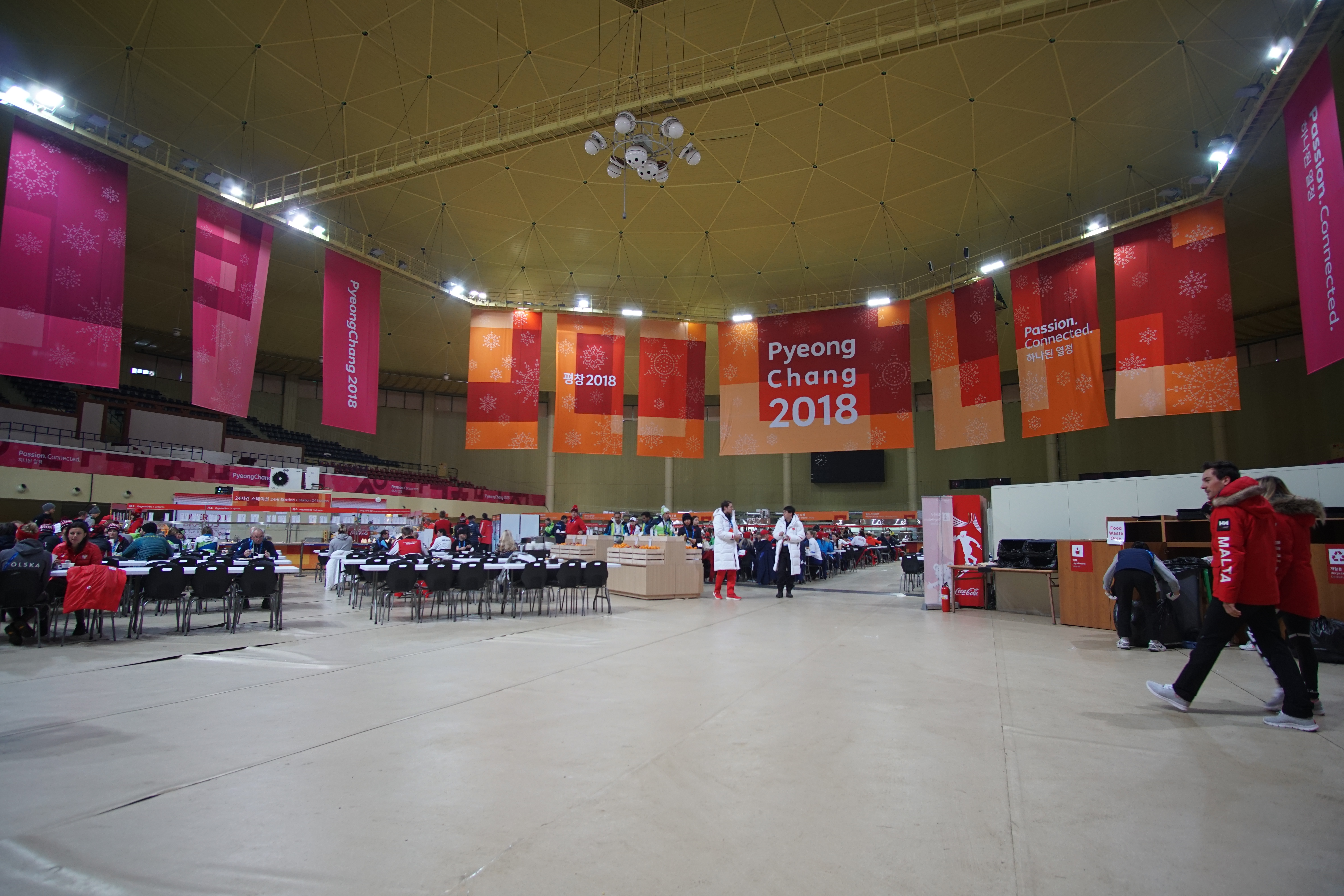 Interior de la Villa Olímpica de Pyeongchang